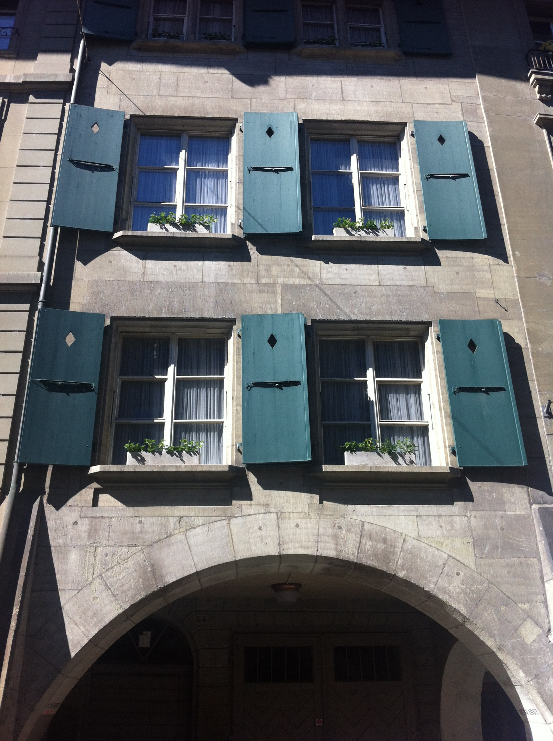 Gespensterhaus an der Junkerngasse 54 in Berns Altstadt Infoquelle Stadtführung, Nachrecherche: Berner Zeitung